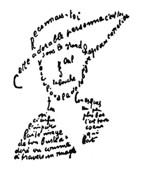 Caligram Apollinaira